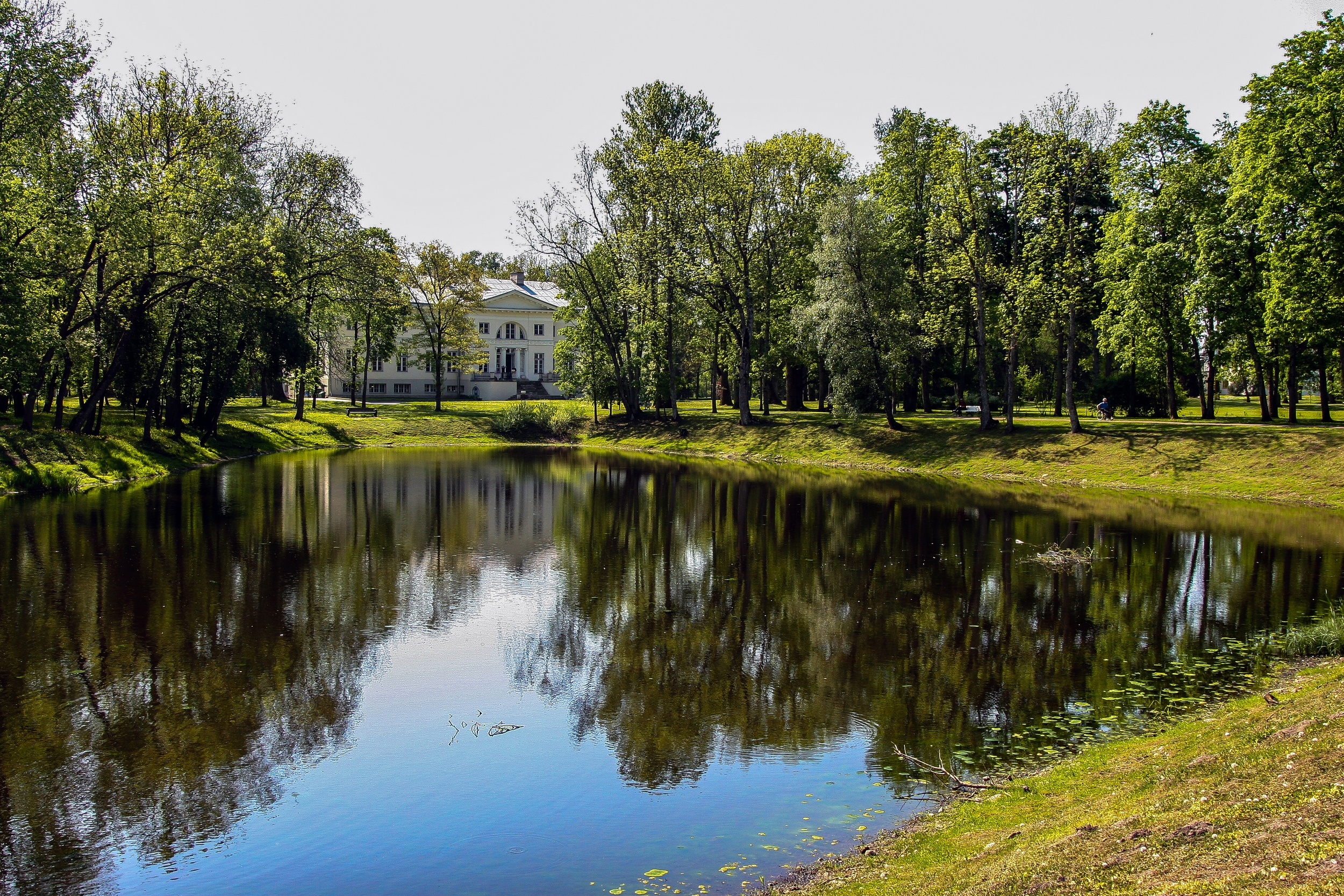 Saku mõisa park